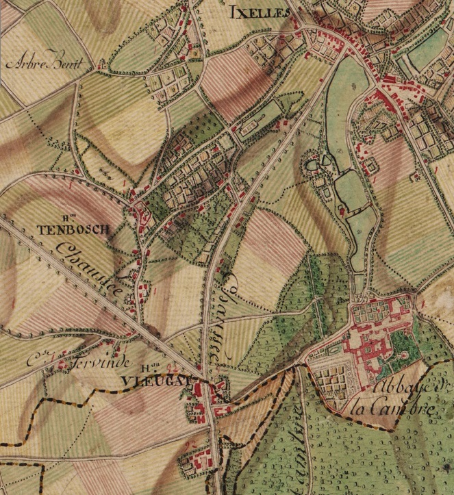 Extrait de la carte de Ferraris n° 77B